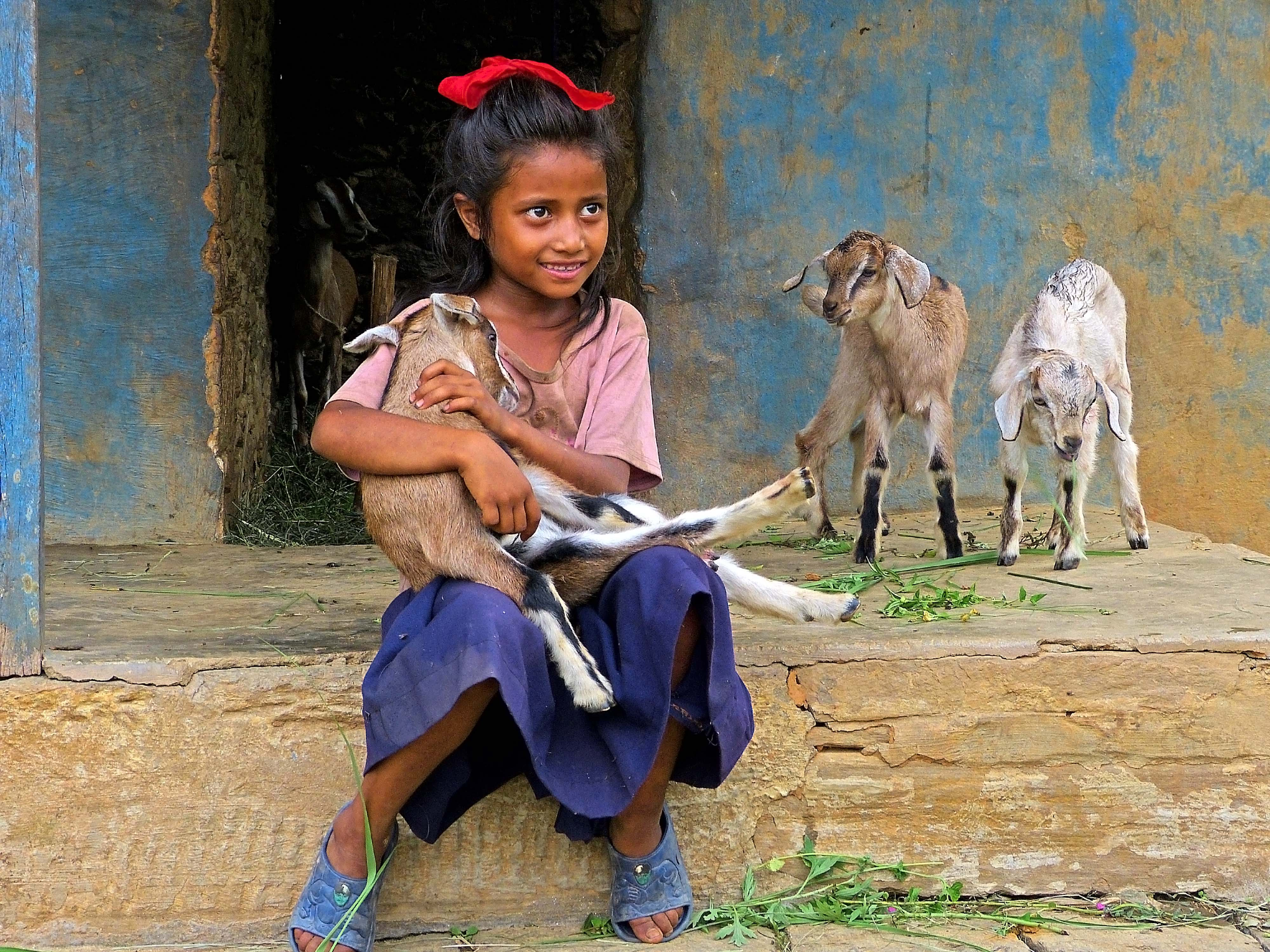 Mädchen mit Ziege in Nepal